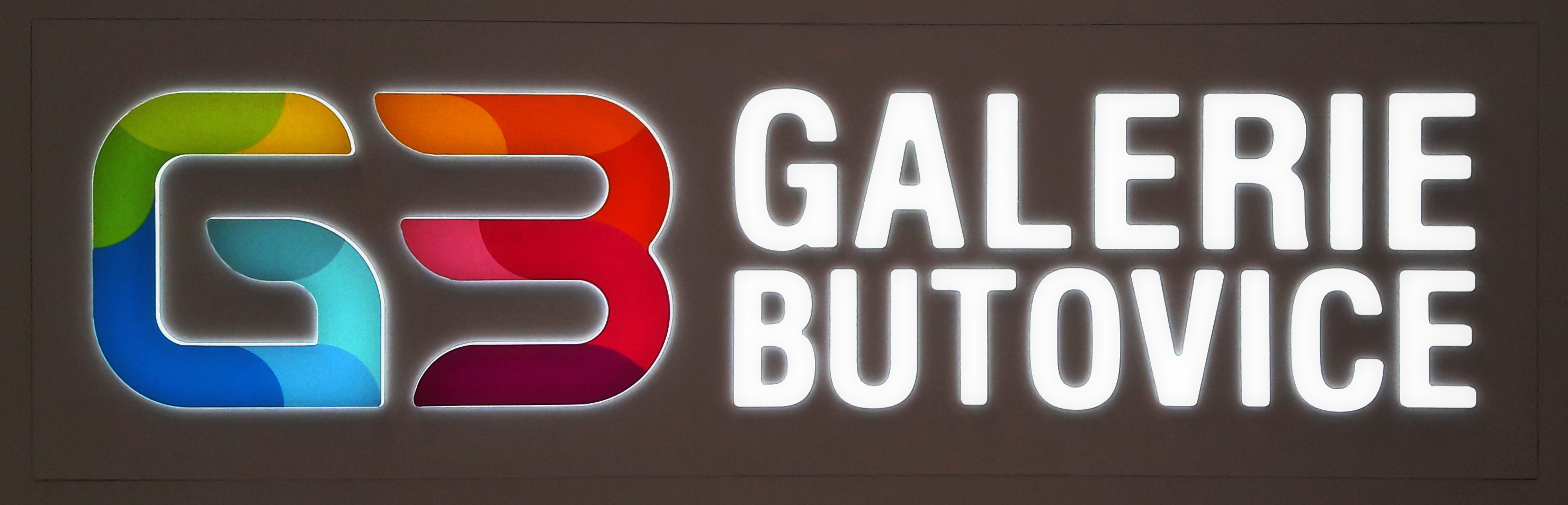 Galerie Butovice logo